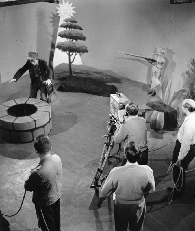 Fernsehstudio Köln Szene aus dem "Der Struwelpeter" von Heinrich Hoffmann.